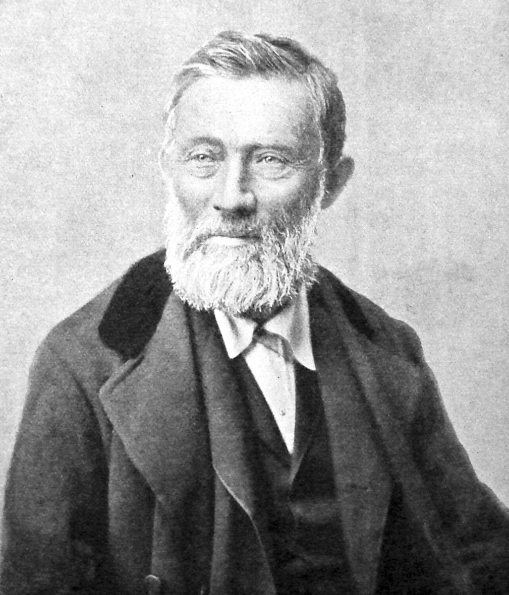 Peter Christian Thamsen Skovgaard (4. april 1817 – 13. april 1875) var dansk landskabsmaler.